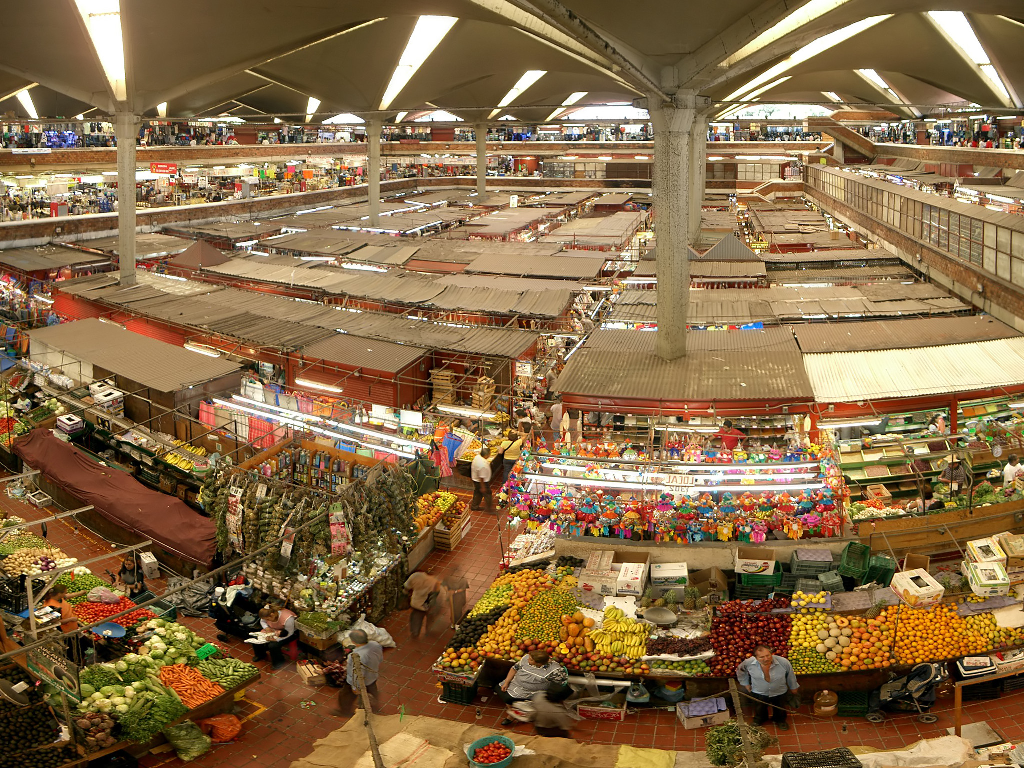 Interior panorama of the Mercado Libertad "San Juan de Dios", Guadalajara